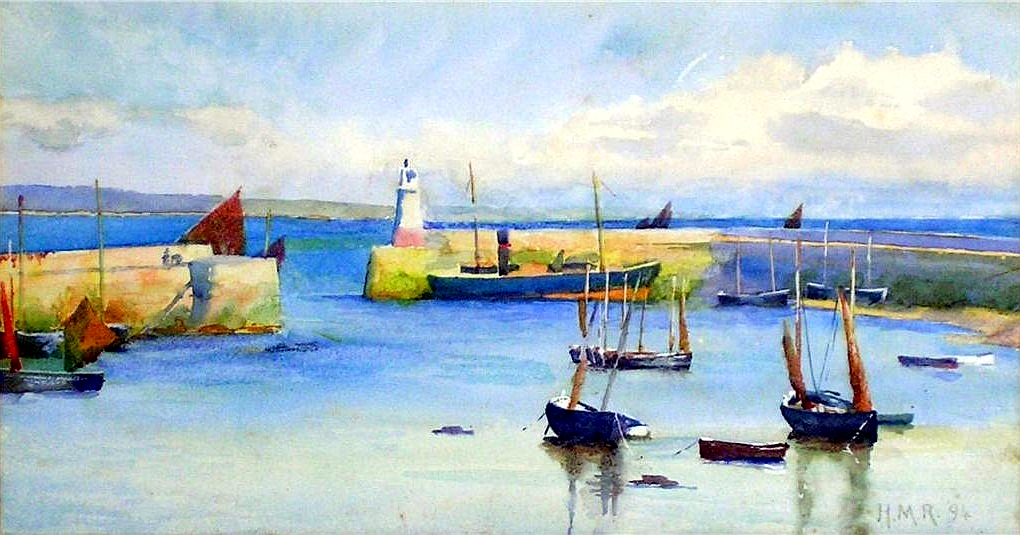 Newlyn Harbour